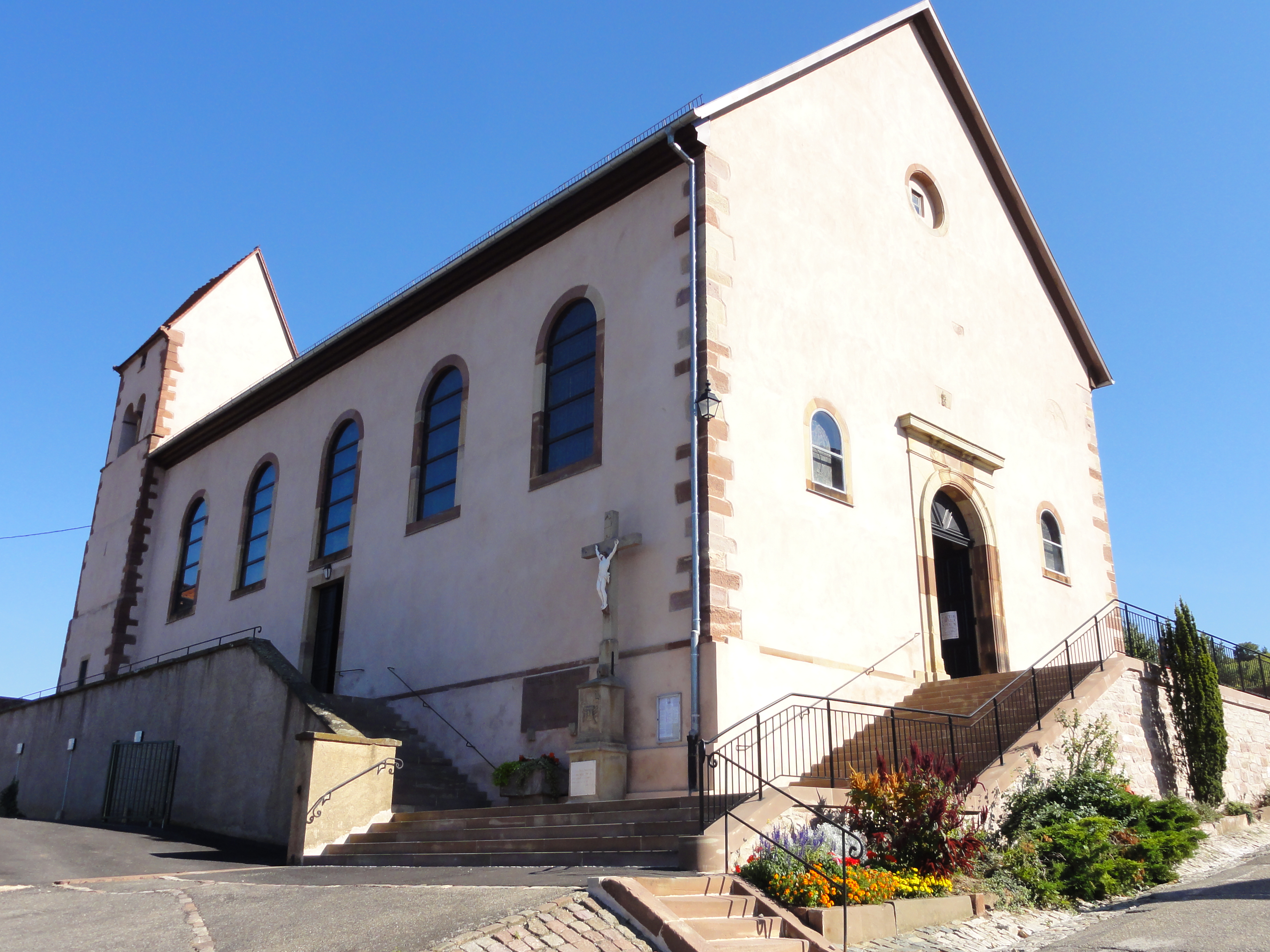 Alsace,Bas-Rhin, Église Saint-Pancrace de Dangolsheim (IA67006568).